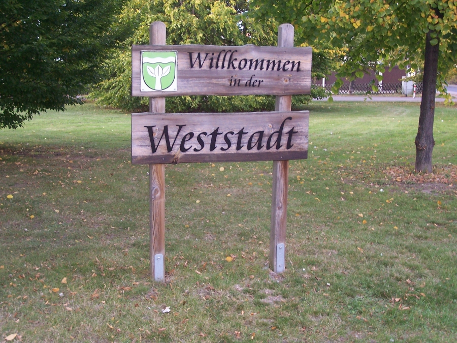 Begrüßungstafel im Braunschweiger Stadtteil Weststadt.